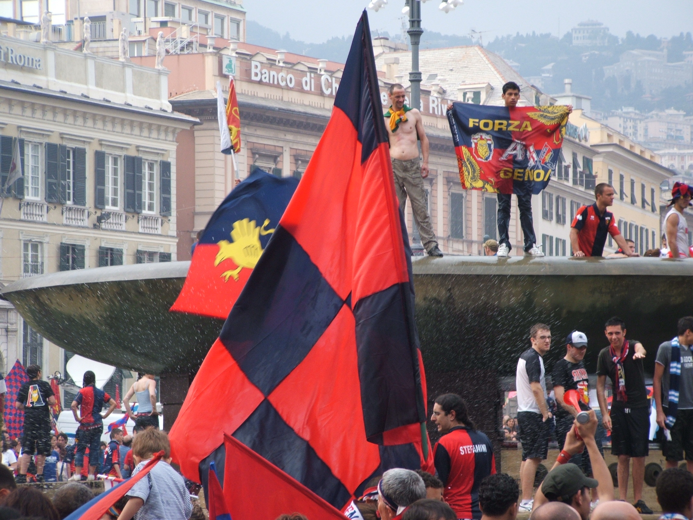 Genova, festeggiamenti per la promozione del Genoa CFC in Serie A